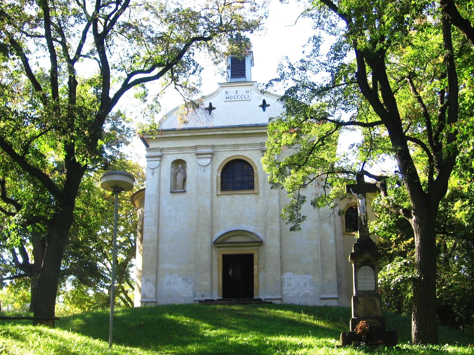 Kaple sv. Barbory, Klobouky u Brna